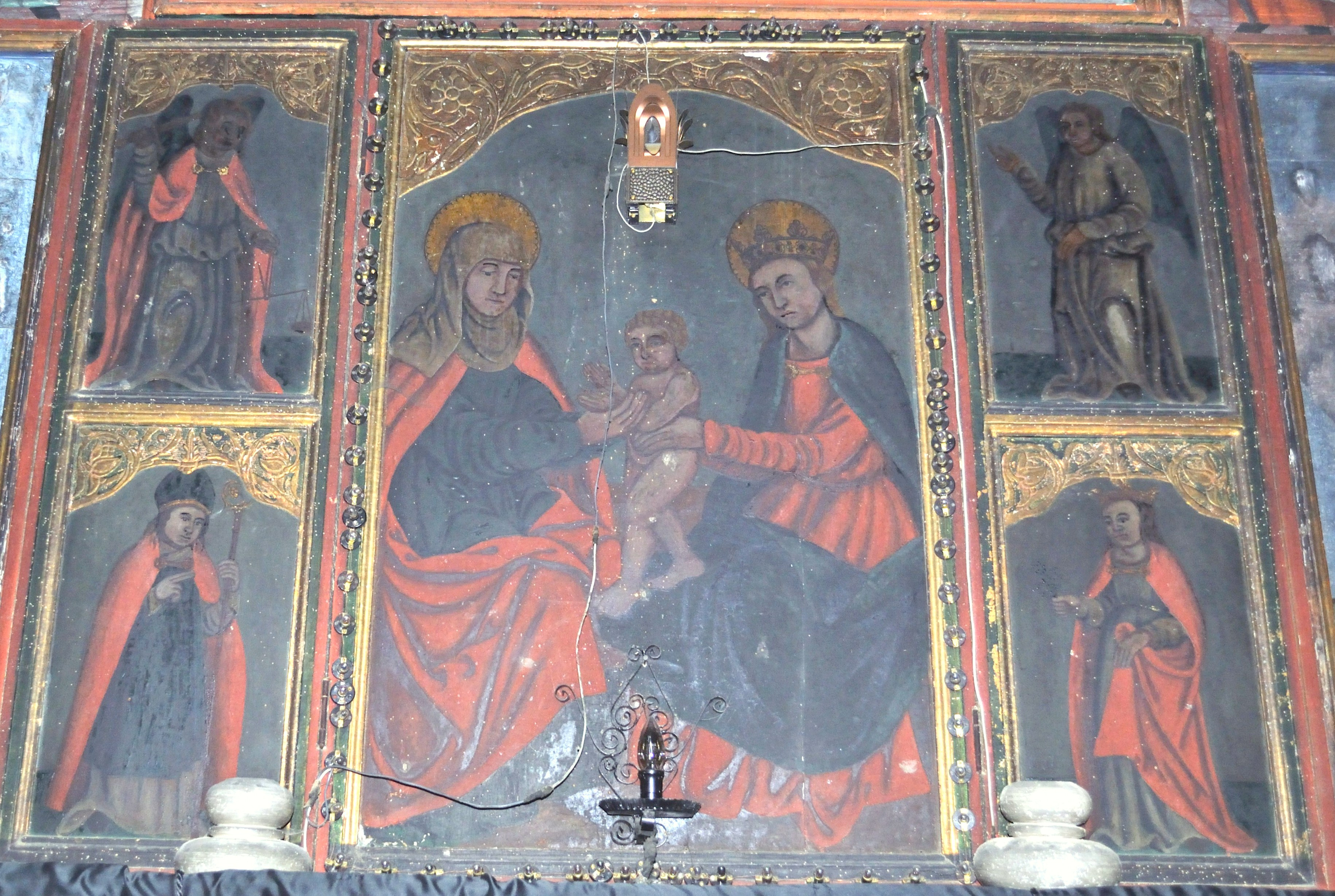 Biserica de lemn „Sfinții Arhangheli” din Ciuleni, județul Cluj